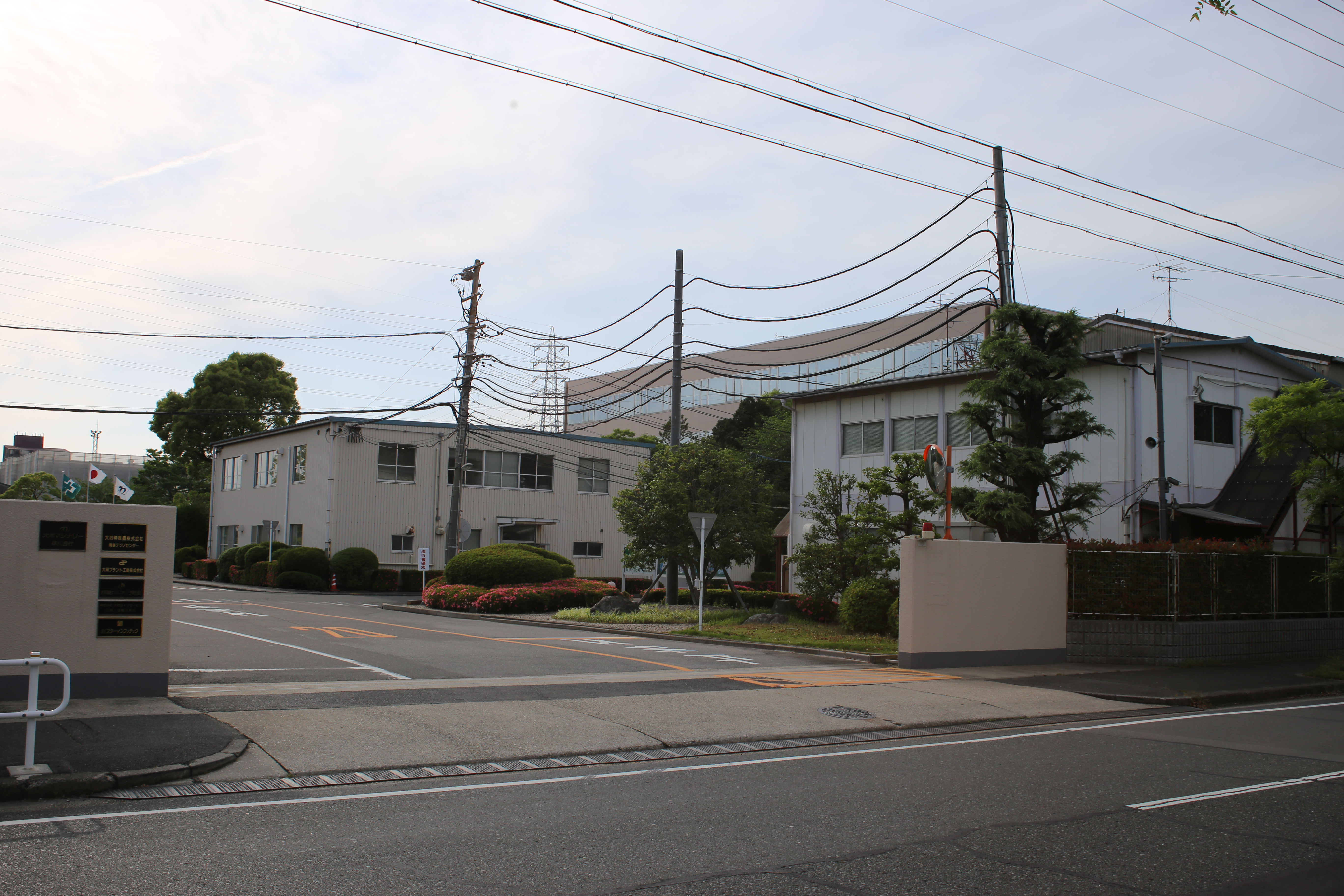 名古屋市南区滝春町の大同プラント工業本社を東側公道南側より撮影